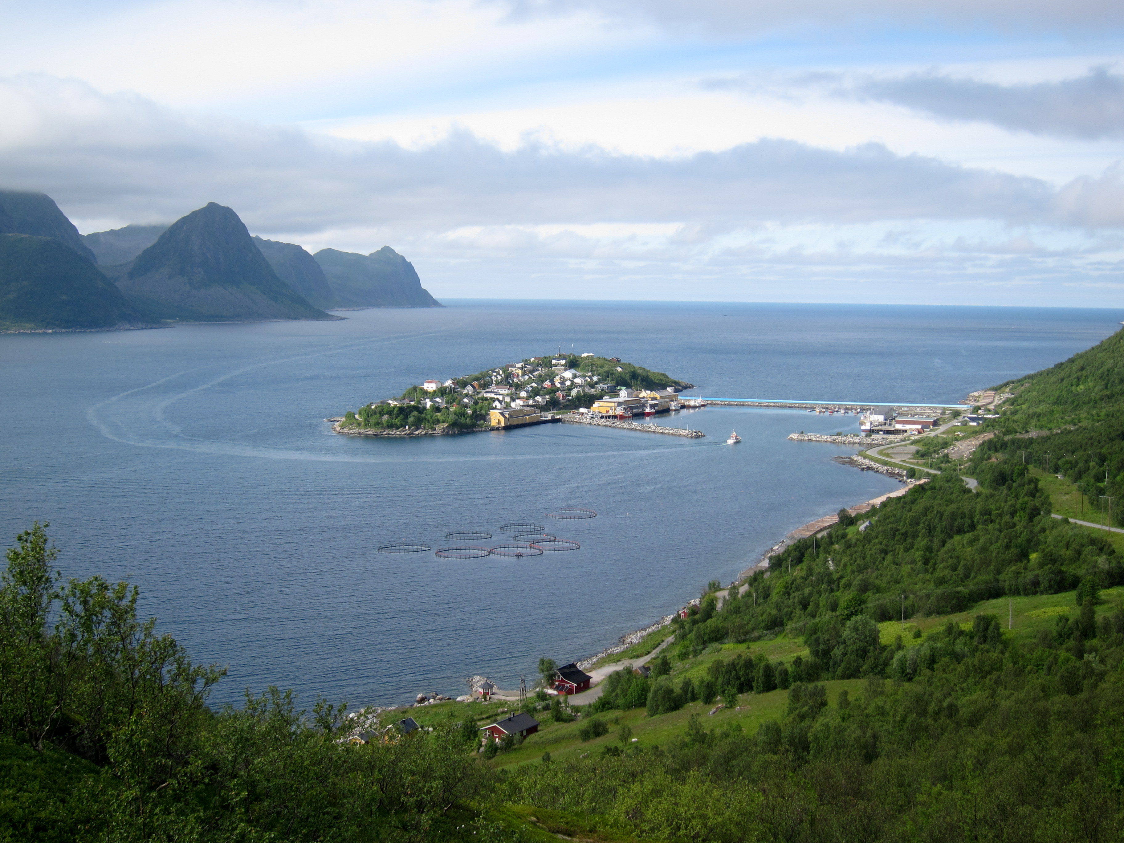 Husøy, Senja